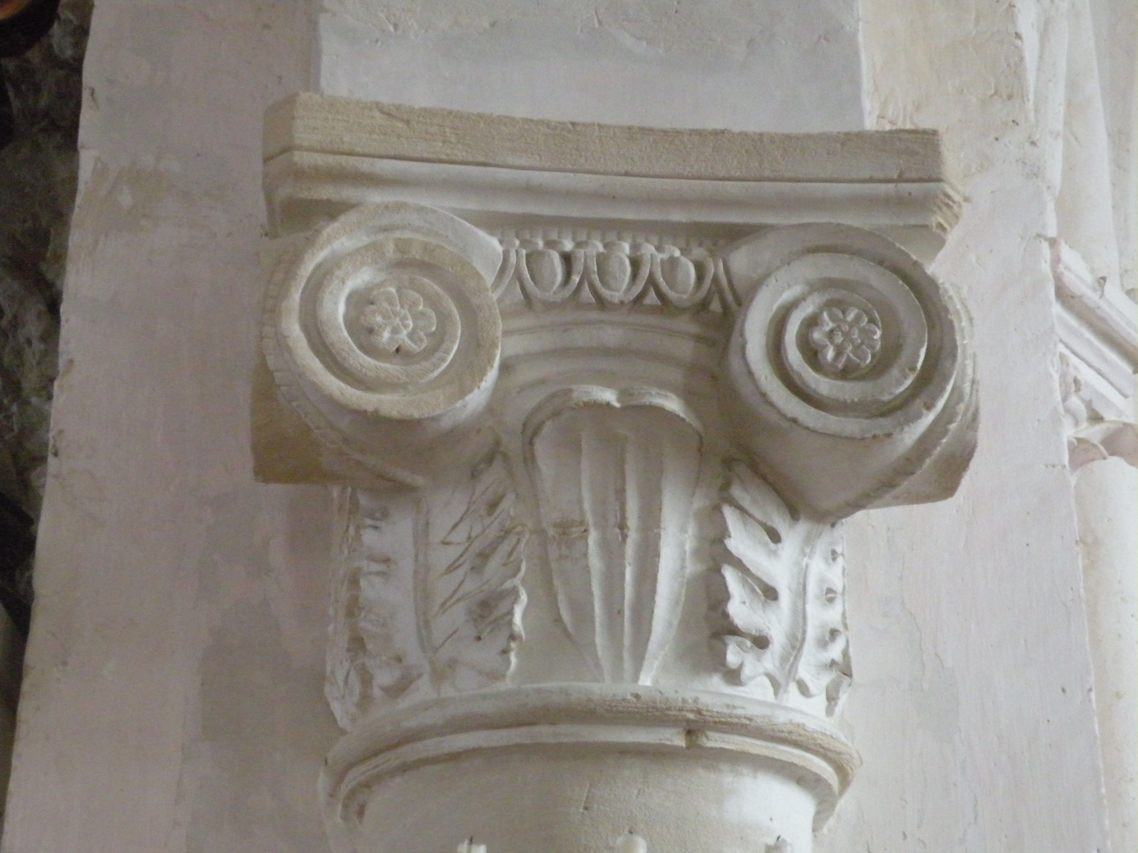 Intérieur de l'église Saint-Pierre-Saint-Paul d'Arronville